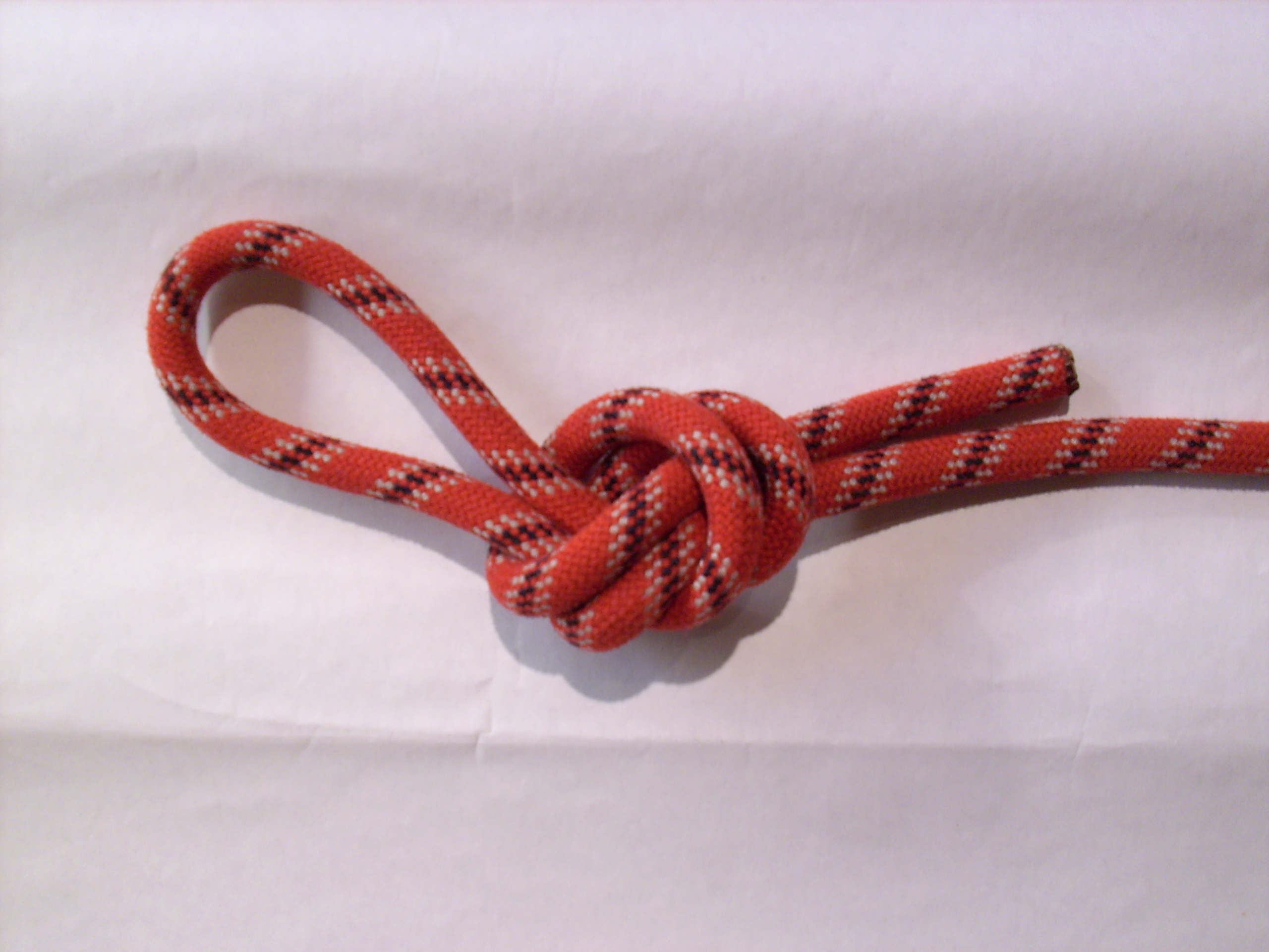 Einfache feste Schlaufe